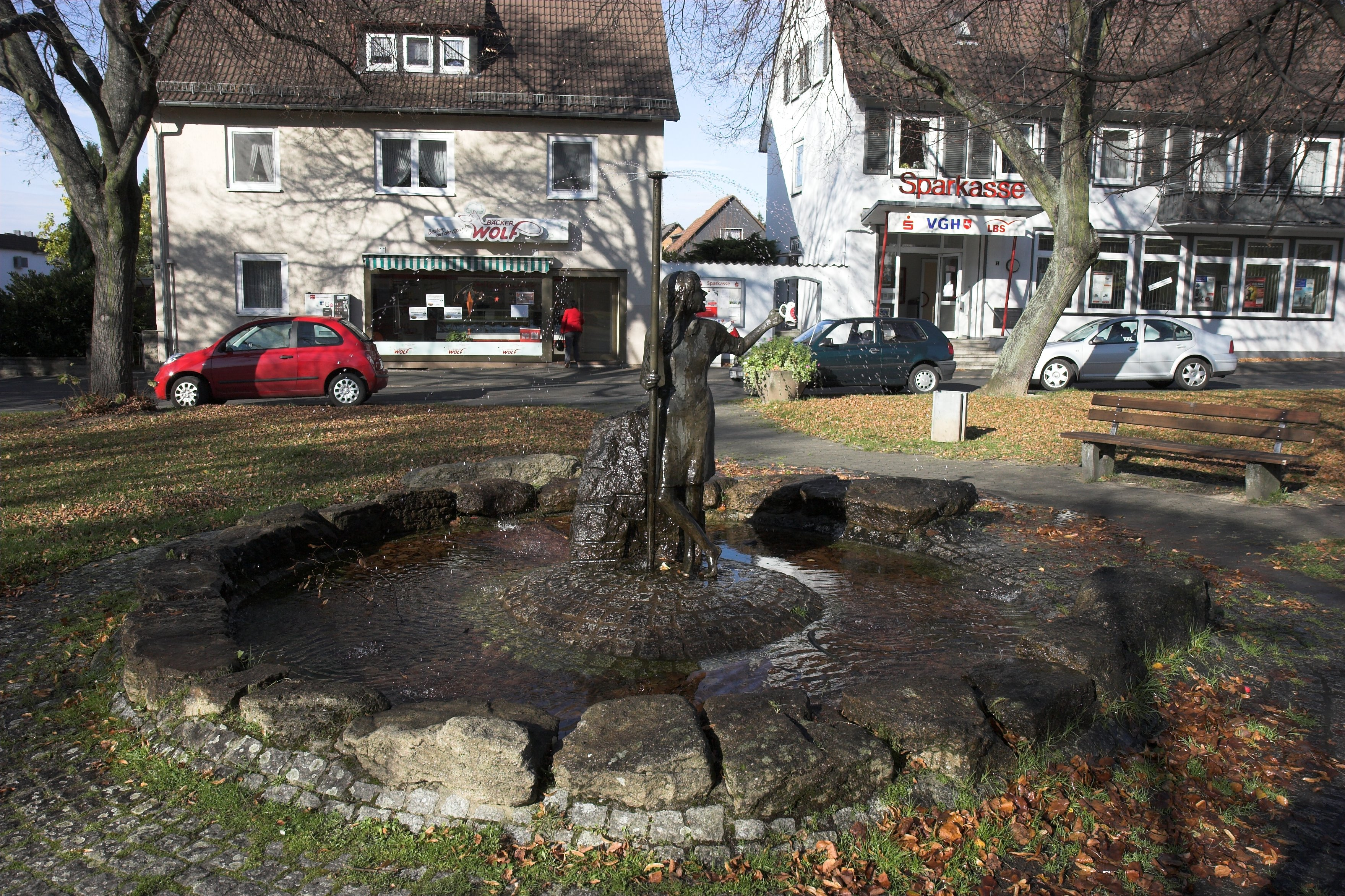 Springbrunnen mit dem "Mädchen mit dem Wasserschirm" im Zentrum von Sudmerberg, erschaffen von Anna Barth